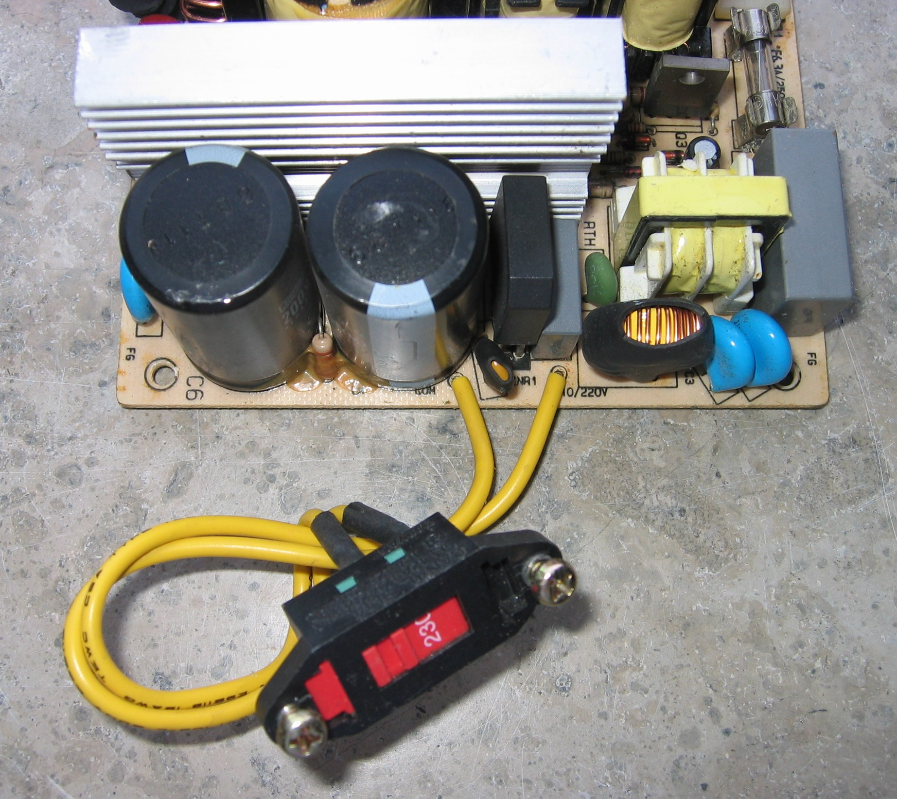 Delonschaltung - Spannungsumschalter im PC-Netzteil